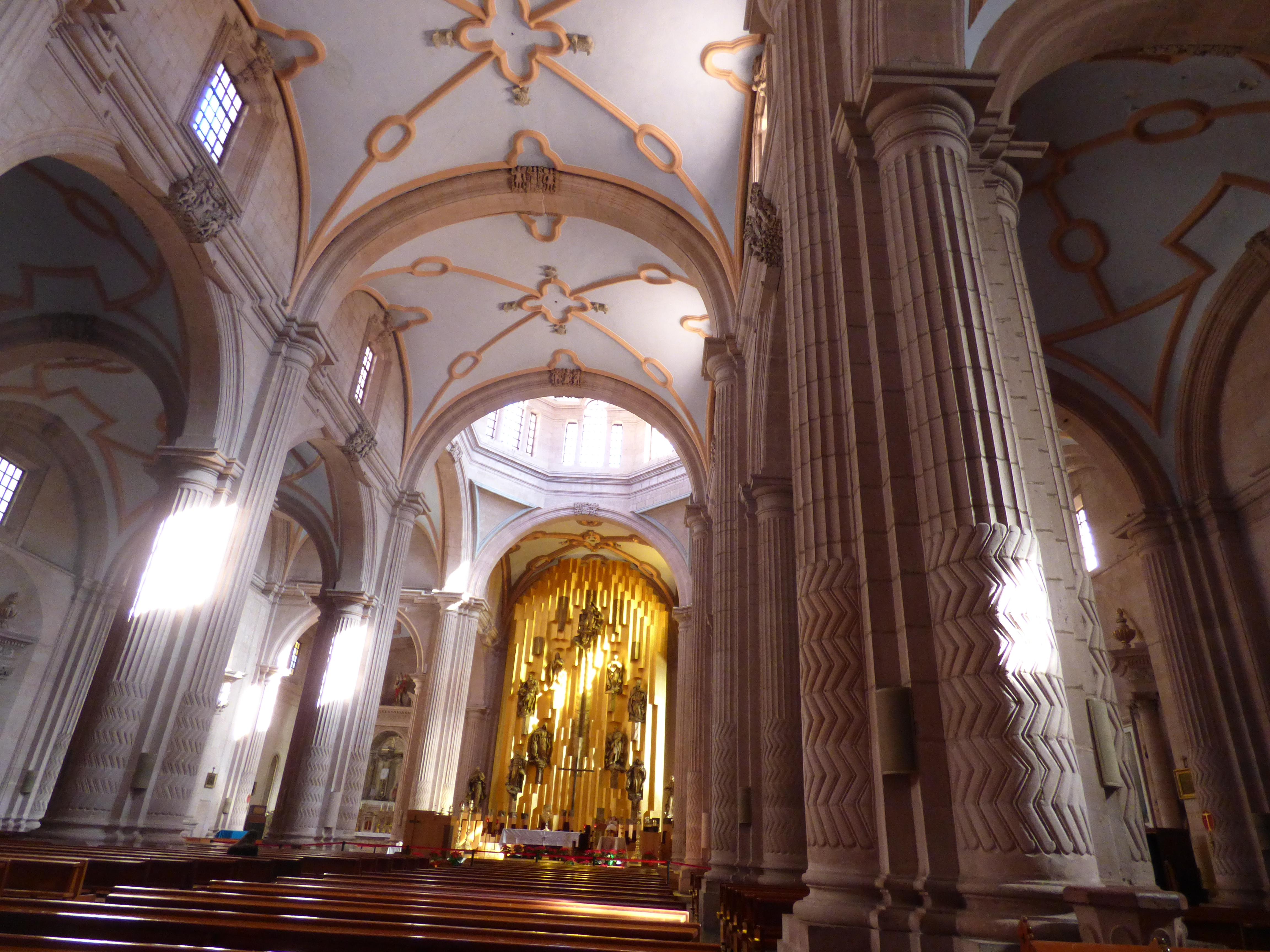 Interior de la catedral de Zacatecas